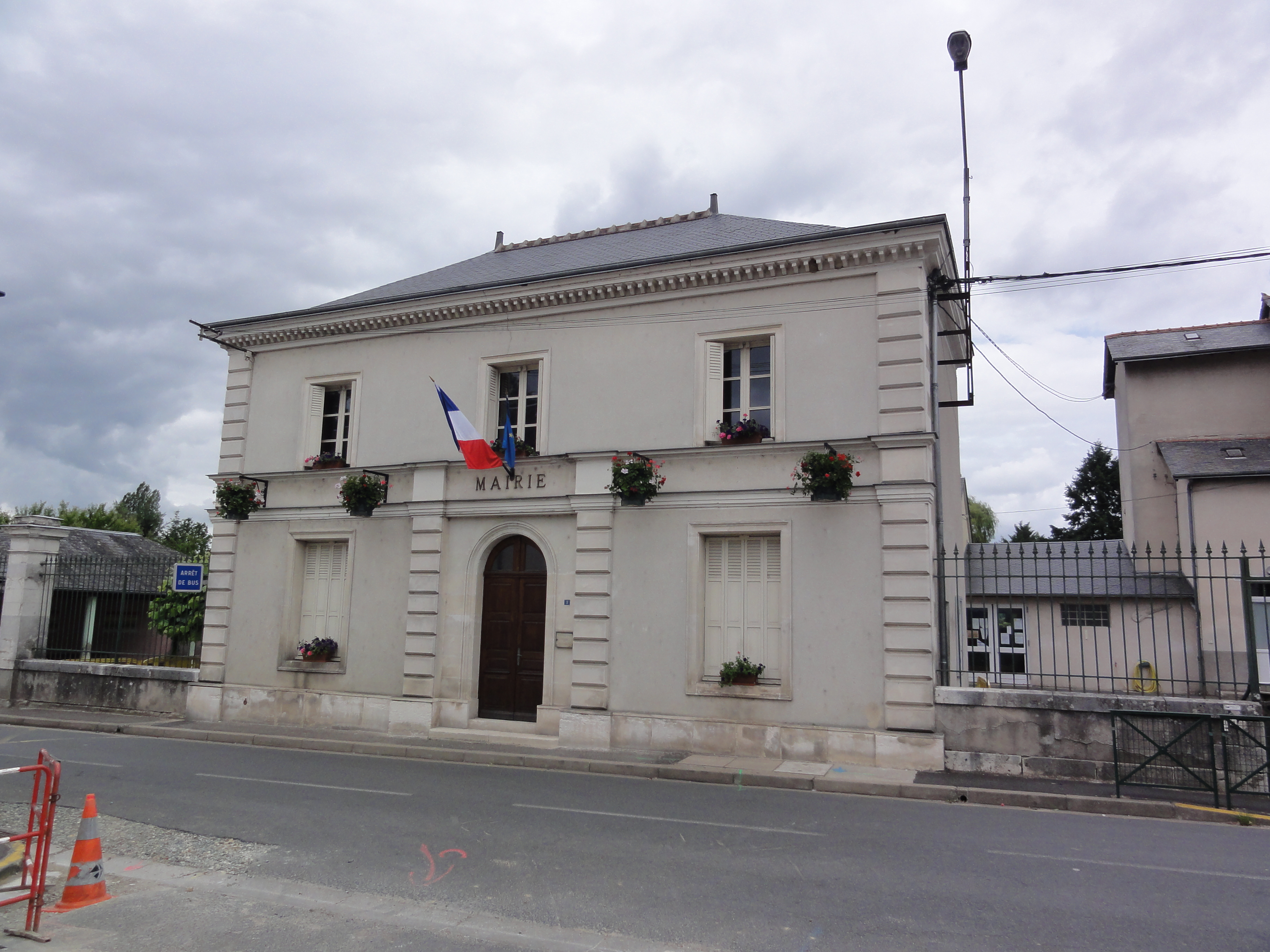 Mosnes (Indre-et-Loire) Mairie